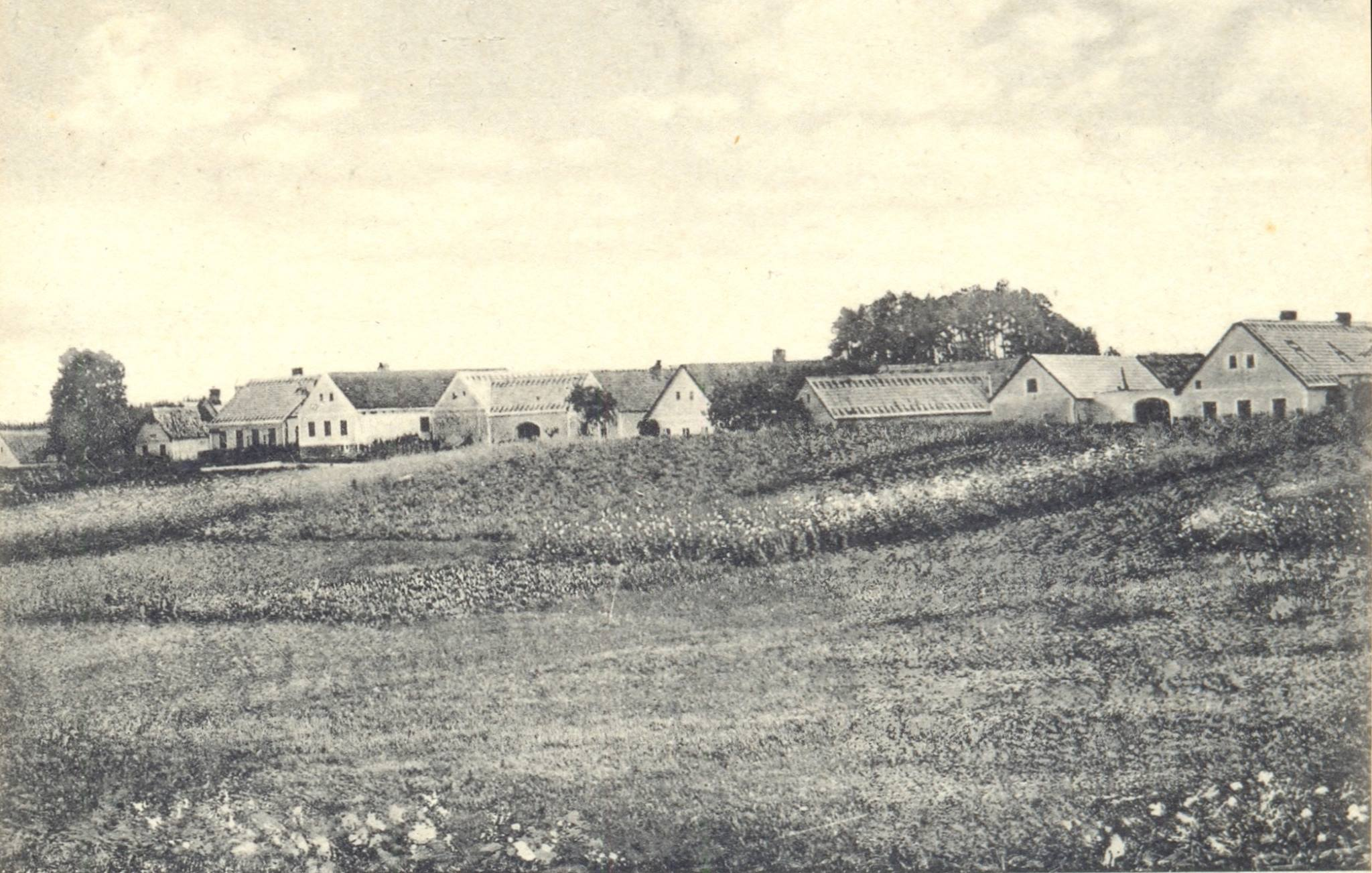 Najdorf / Nová Ves u Klikova / Kösslersdorf - historická pohlednice